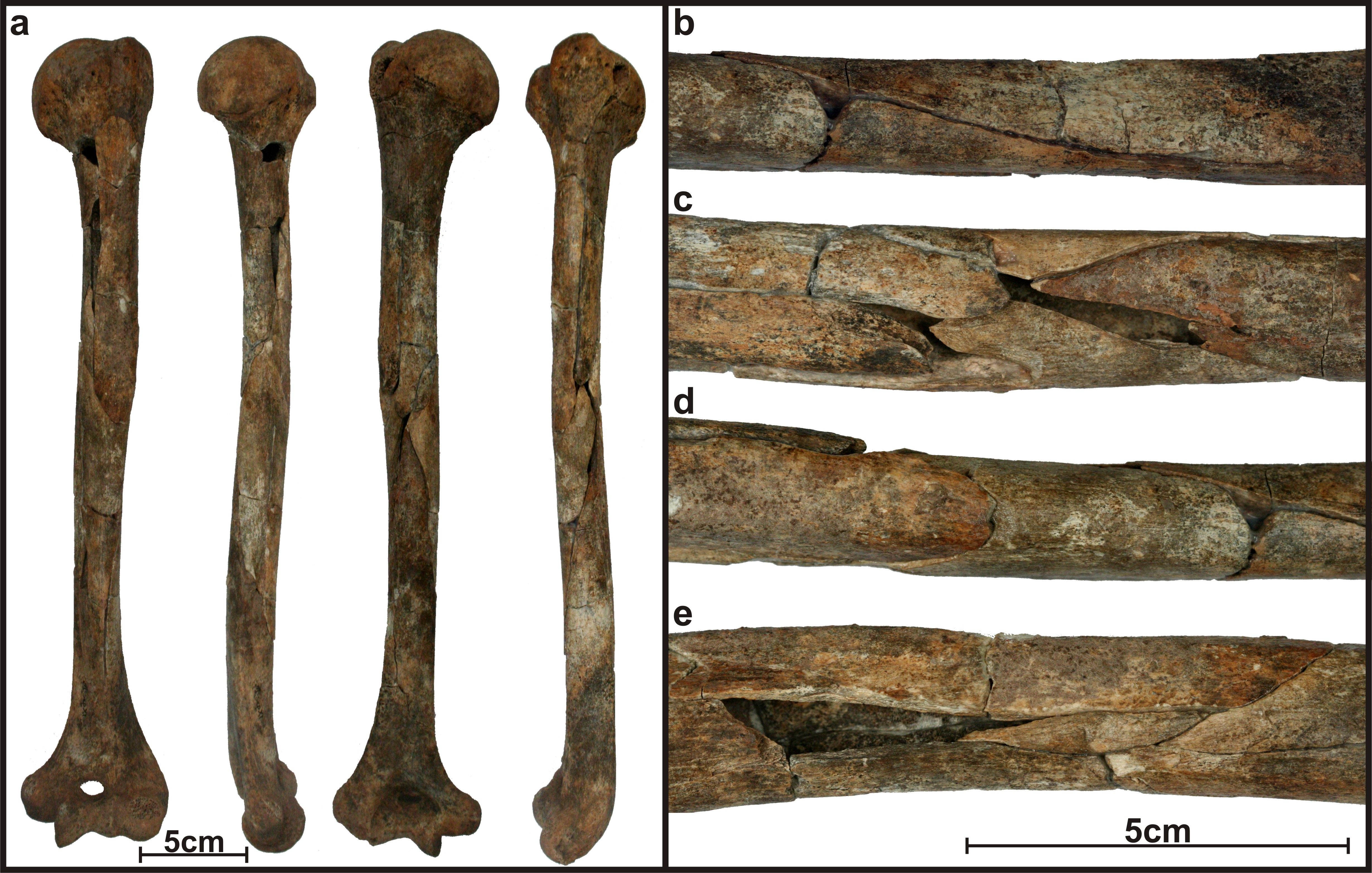 Lapa do Santo - Sepultamento 11 - Fotos das fraturas não cicatrizadas (perimortem) noaumero esquerdo. A Lapa do Santo é um sítio arqueológico localizado na região de Lagoa Santa em Minas Gerais. Apresenta um rico registro da cultura material dos grupos que habitaram o Brasil central durante Holoceno Inicial, Médio e Final. Dezenas de sepultamentos humanos foram encontrados na Lapa do Santo. O Sepultamento 11 era composto pelos ossos de um único indivíduo adulto que foram enterrados numa cova circular e que não apresentavam lógica anatômica aparente. Inúmeros ossos longos apresentam fraturas não cicatrizadas (perimortem). Não foi encontrada nenhuma estrutura de pedras sobre o esqueleto.